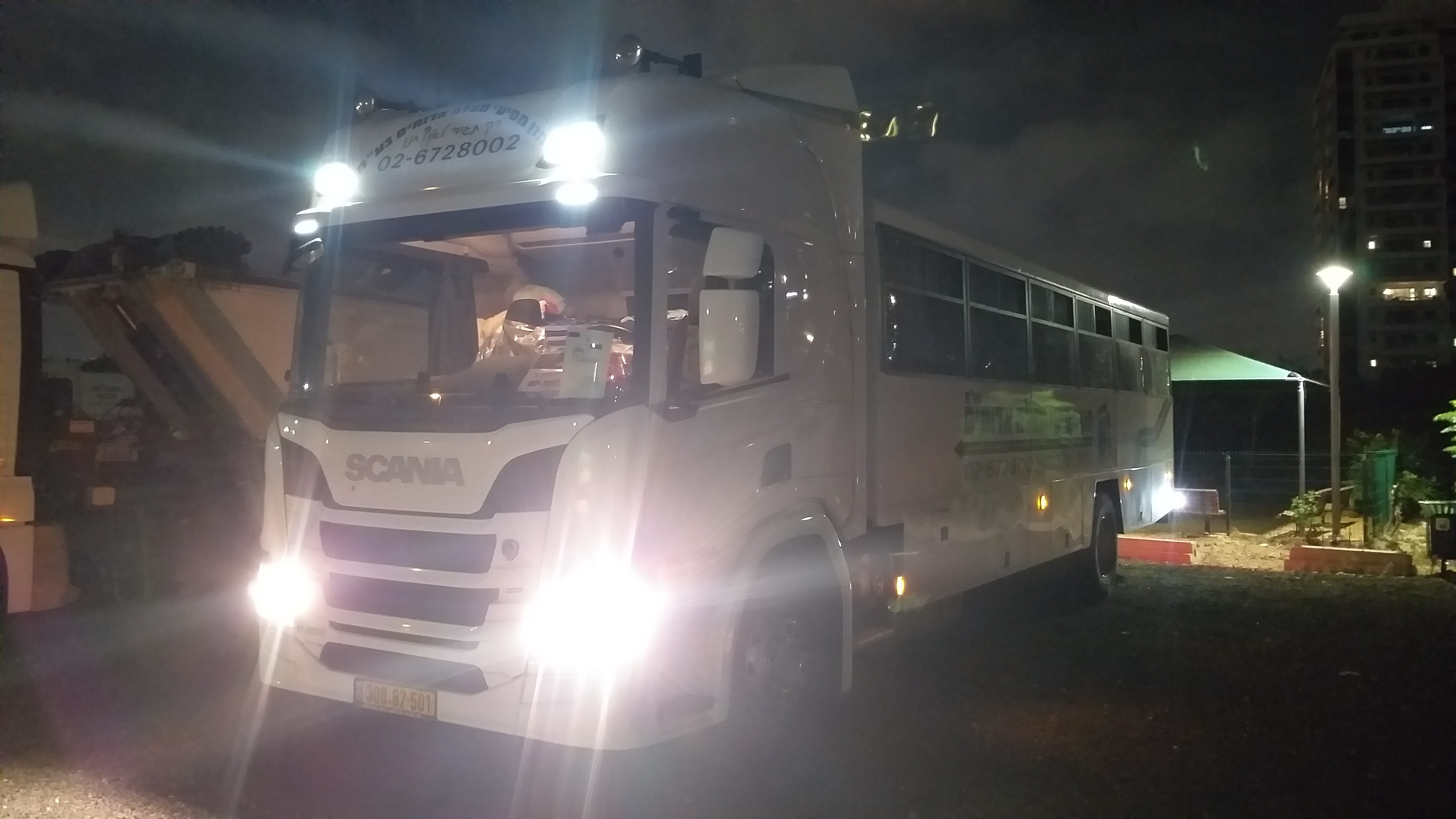 טיוליות 2020